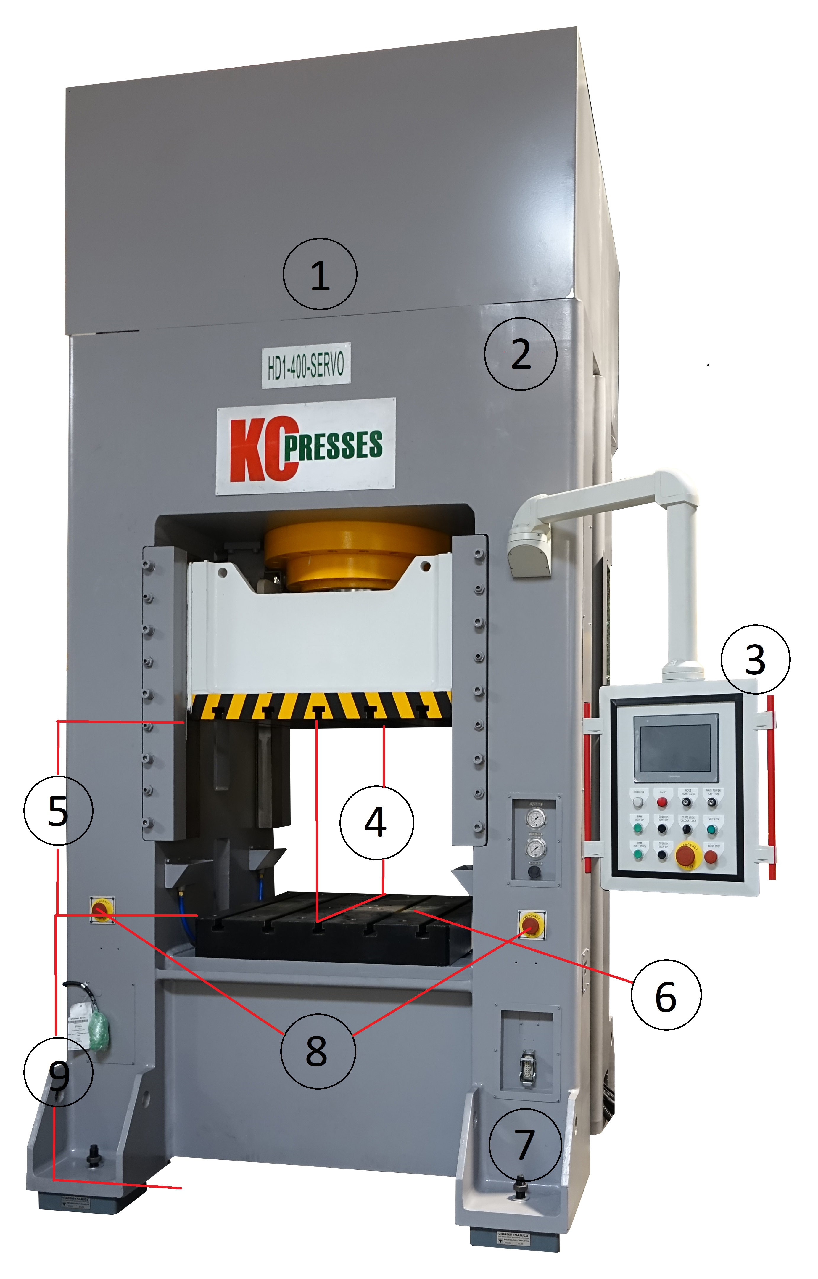 Hidrauliskās spiedes uzbūve